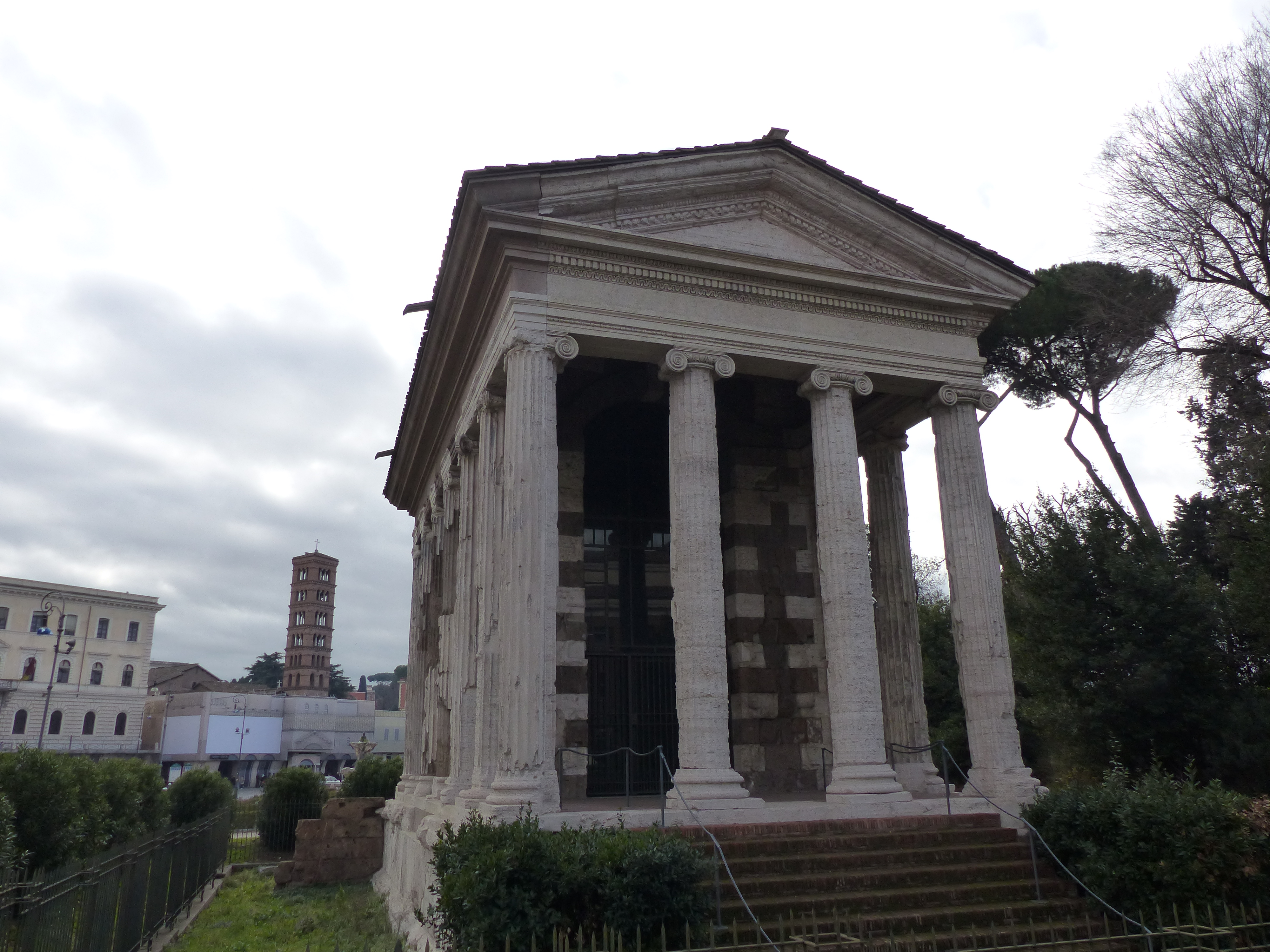 Templo de Portuno, Roma